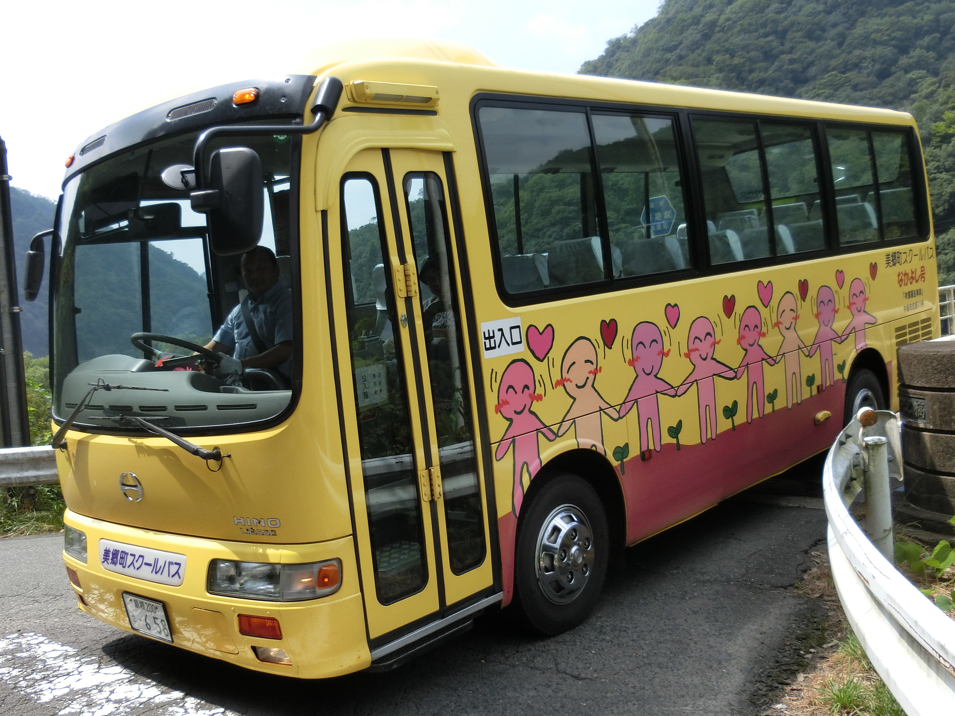 美郷町スクールバスに使用されるリエッセ。竹駅前で撮影。